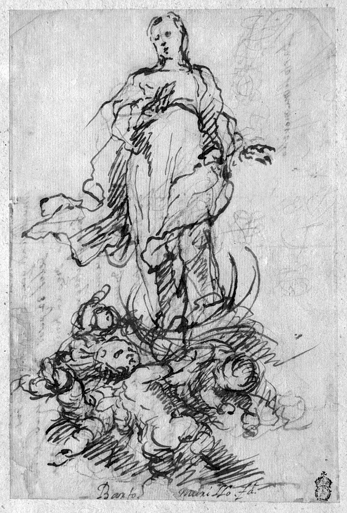 Inmaculada Concepción, 194 × 130 mm. Madrid, Museo del Prado.